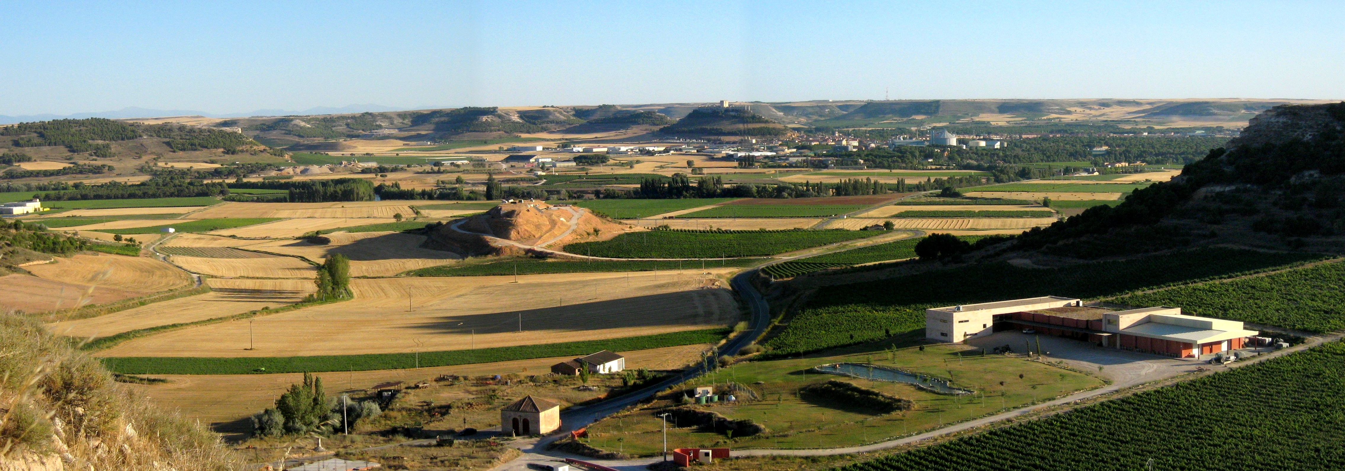 Curiel de Duero. Vista del Castillo de Peñafiel desde el Castillo de Curiel.